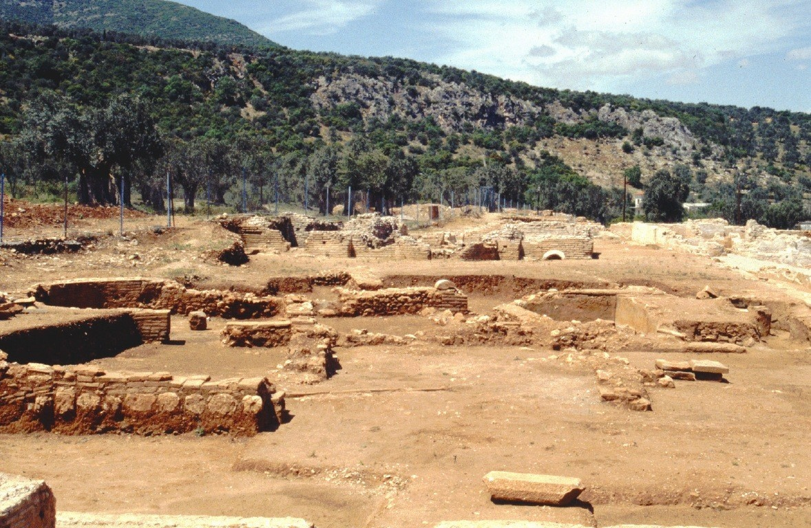 Villa des Herodes Atticus bei Eva Dolianon